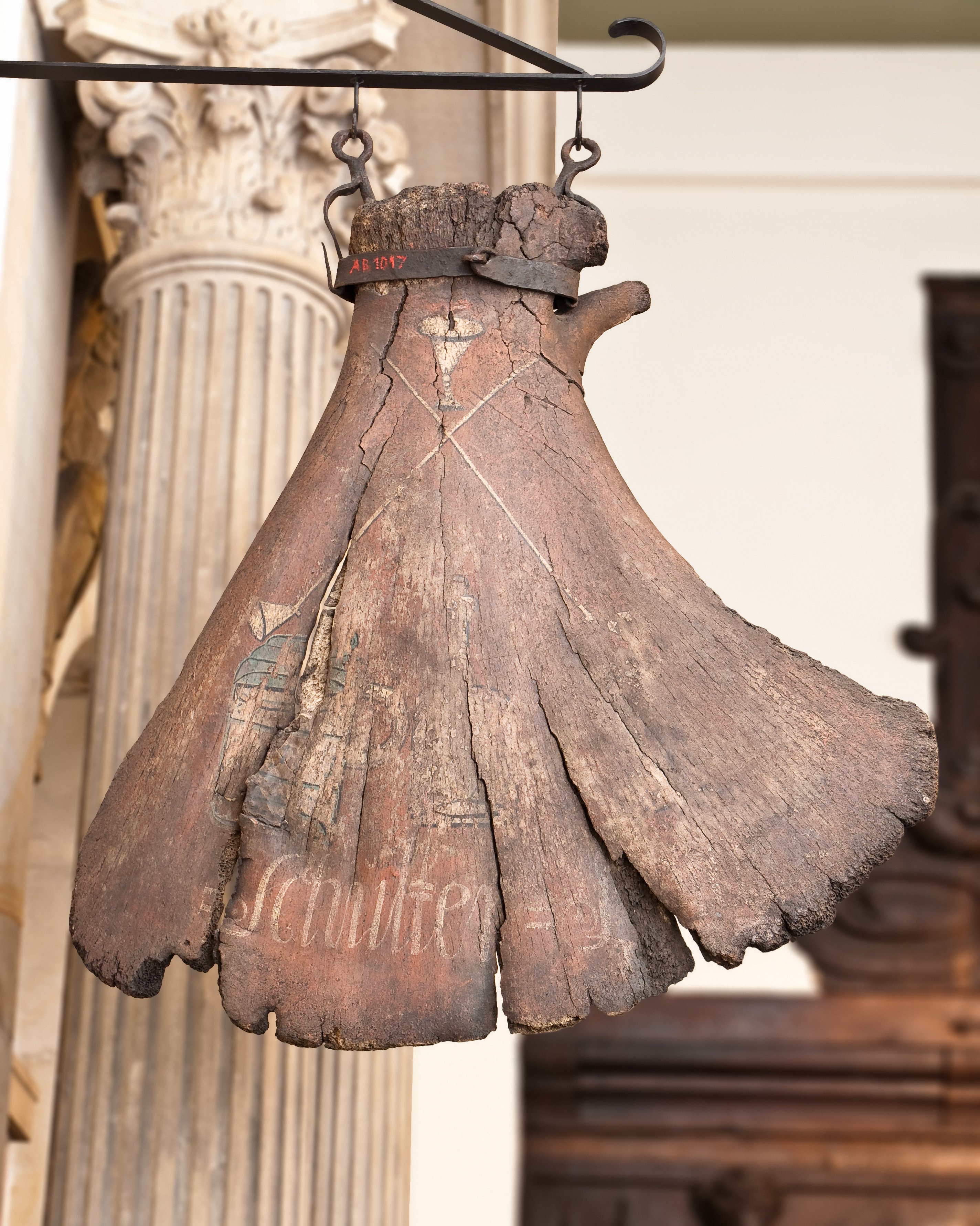 Walschulterblatt als Gasthausschild aus dem 18. Jahrhundert in Hamburg. Fotografiert im Museum für Hamburgische Geschichte, Hamburg, Deutschland.